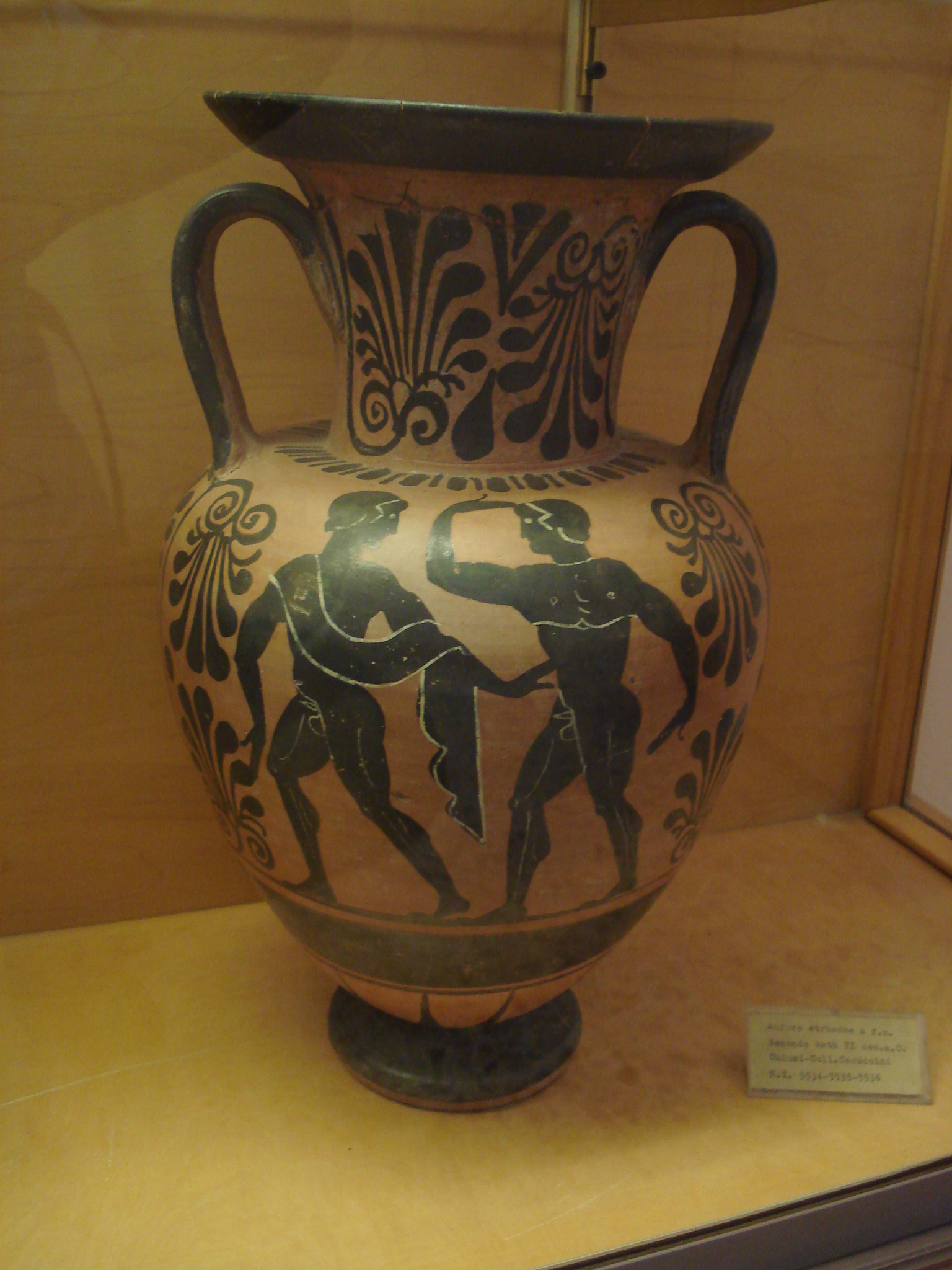 Anfora etrusca a figure nere con due danzatori nudi (sec. VI a.C:). Da Chiusi. Museo archeologico regionale di Palermo, 28 settembre 2006. Foto di Giovanni Dall'Orto.